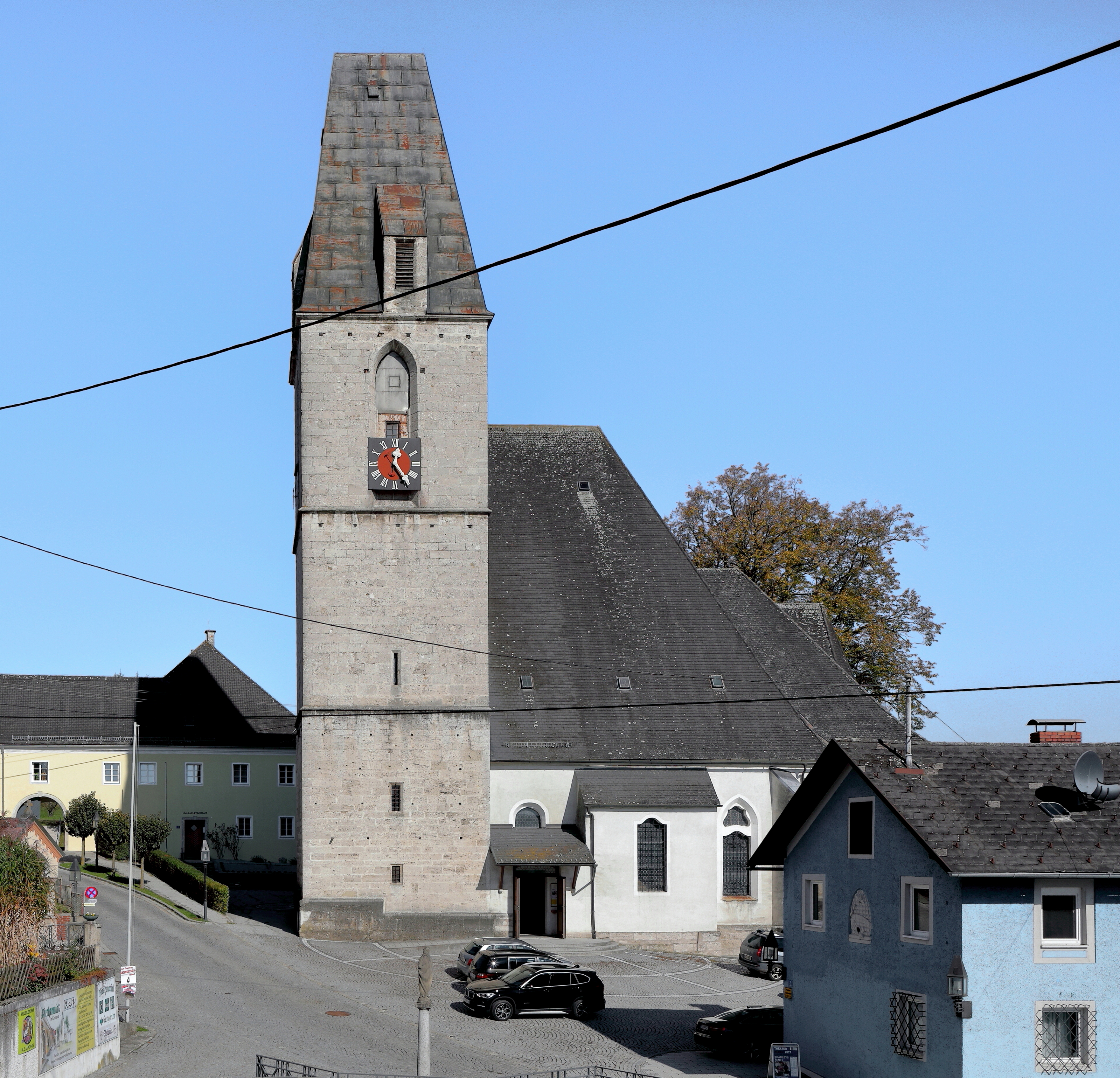 Die röm.-kath. Pfarrkirche hl. Martin in der oberösterreichischen Gemeinde Kematen an der Krems. Eine kurze gotische Staffelkirche mit barocker Einrichtung.